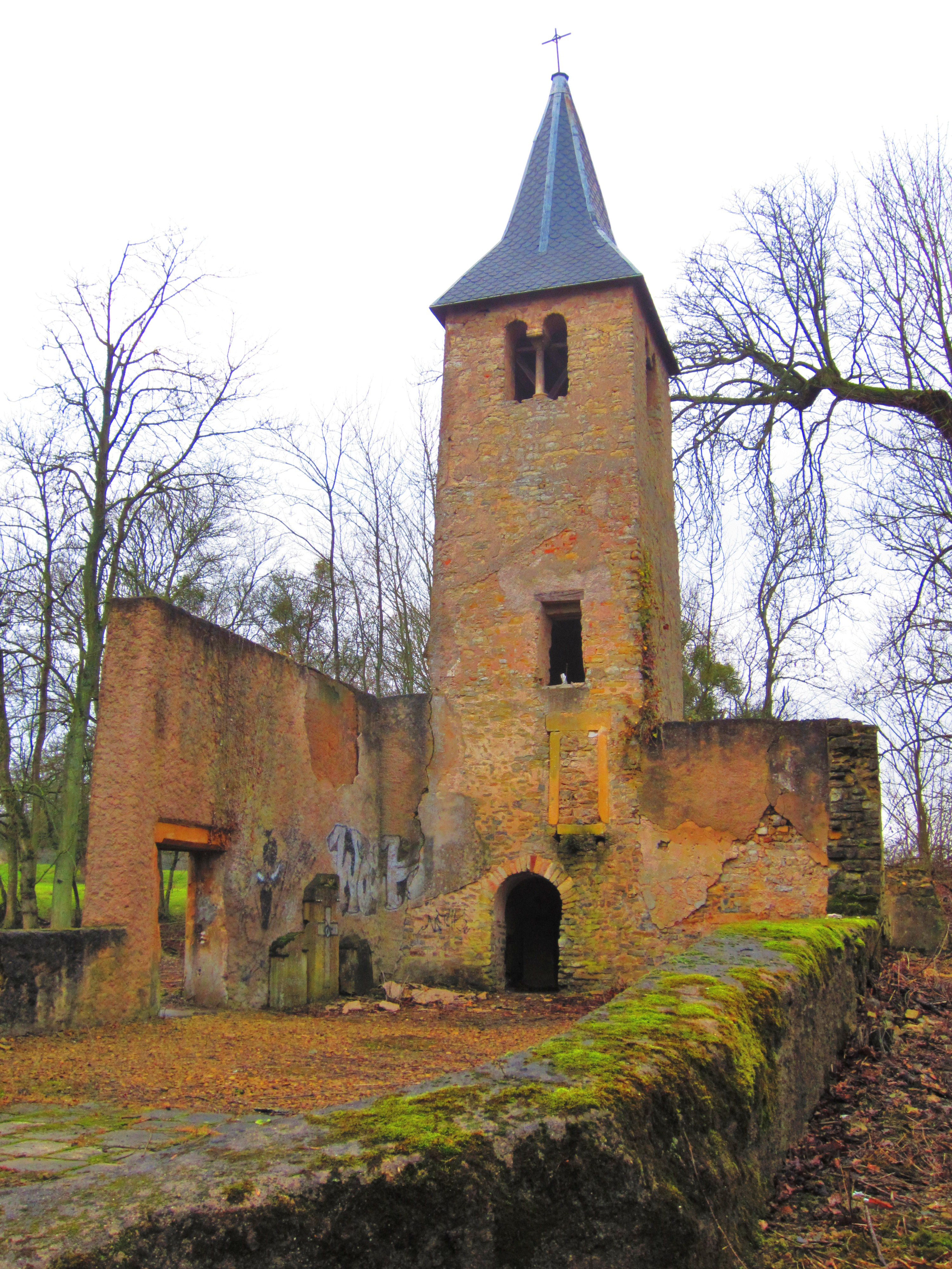 Description